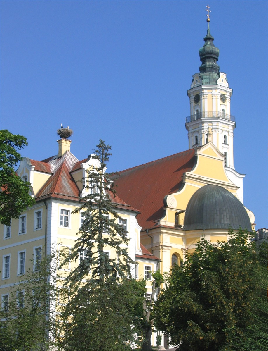 Donauwoerth, Kloster Heilig Kreuz